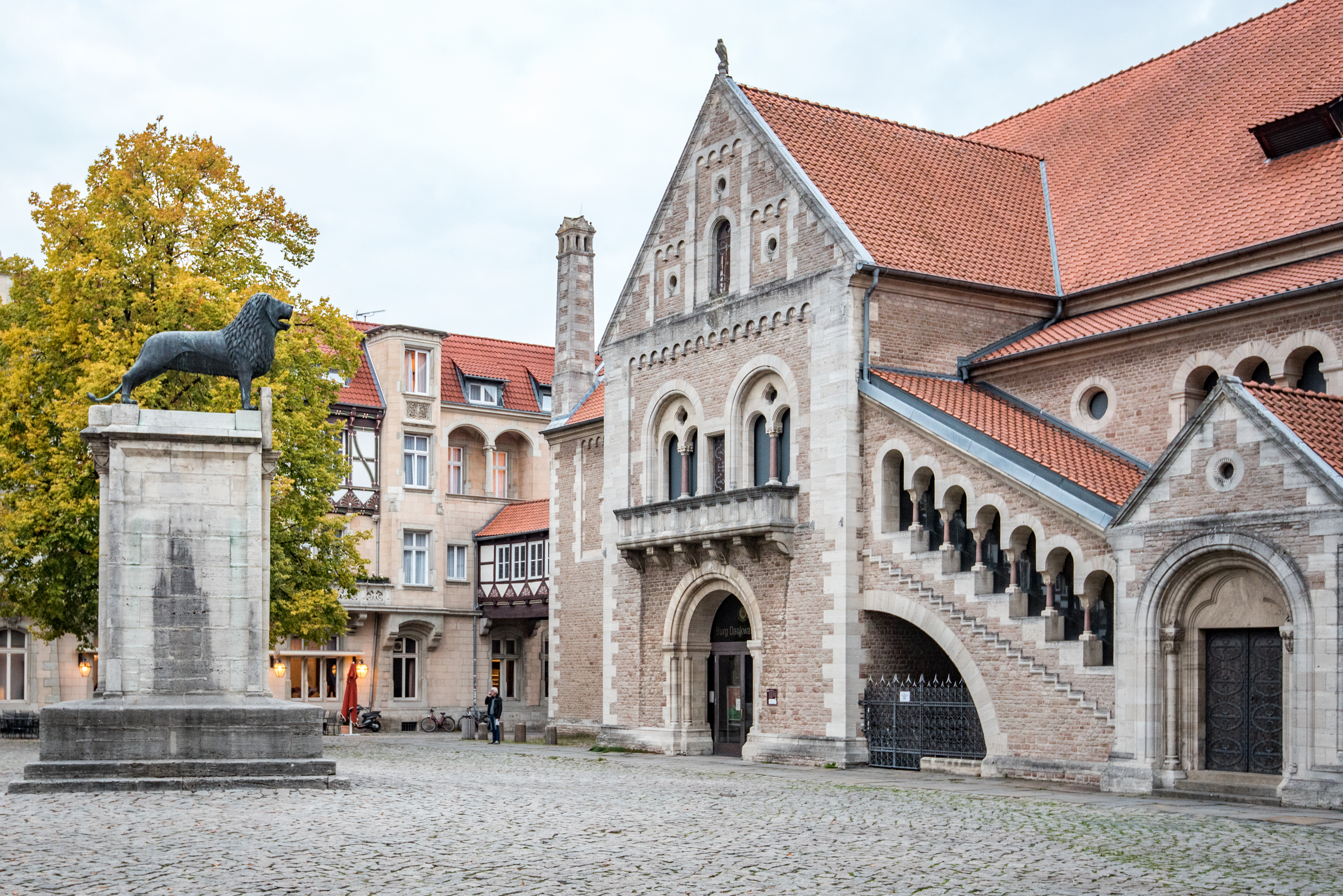 Braunschweig, Löwendenkmal, Burg Dankwarderode